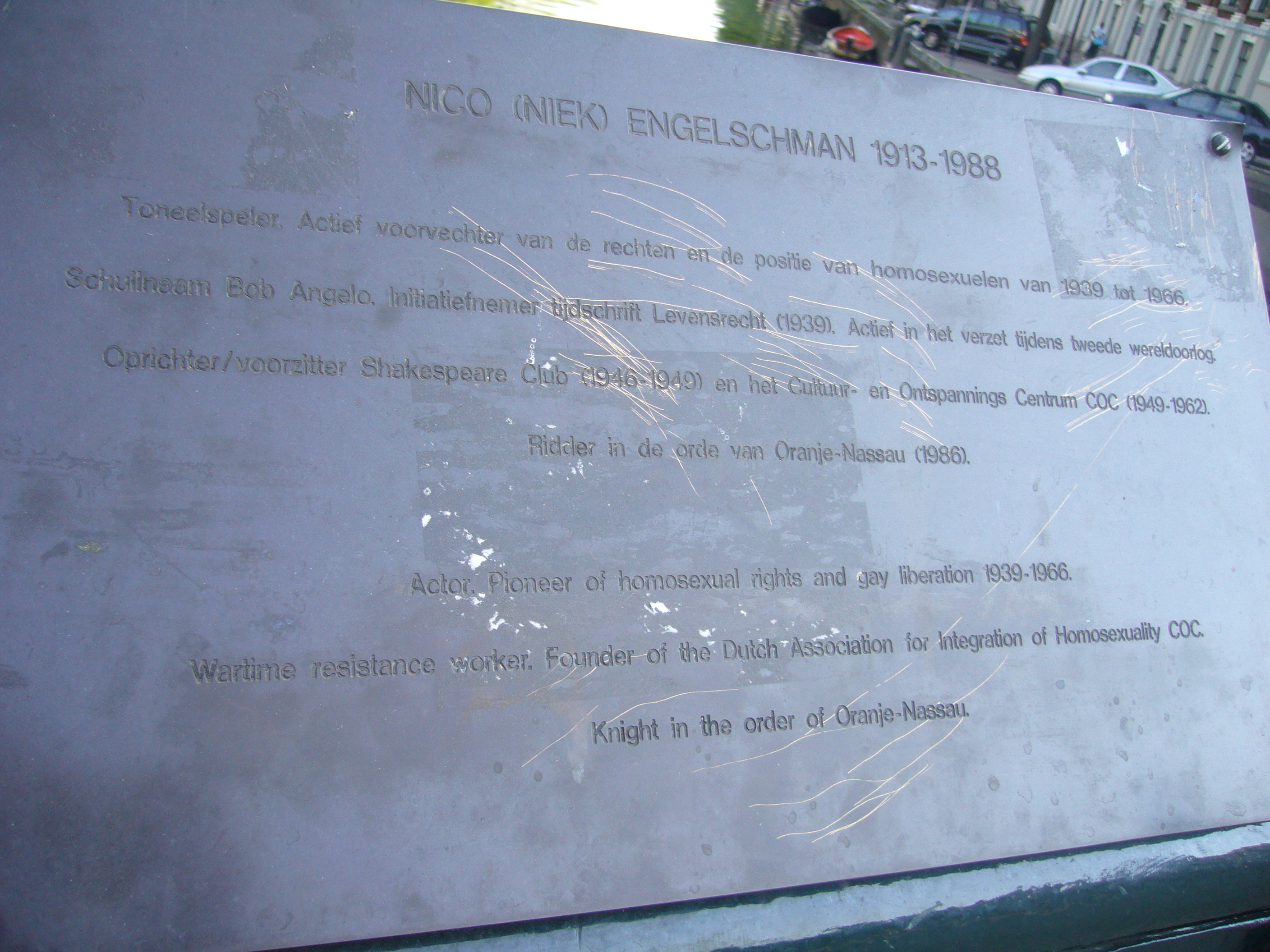 Niek Engelschman: gedenkplaat op de brug